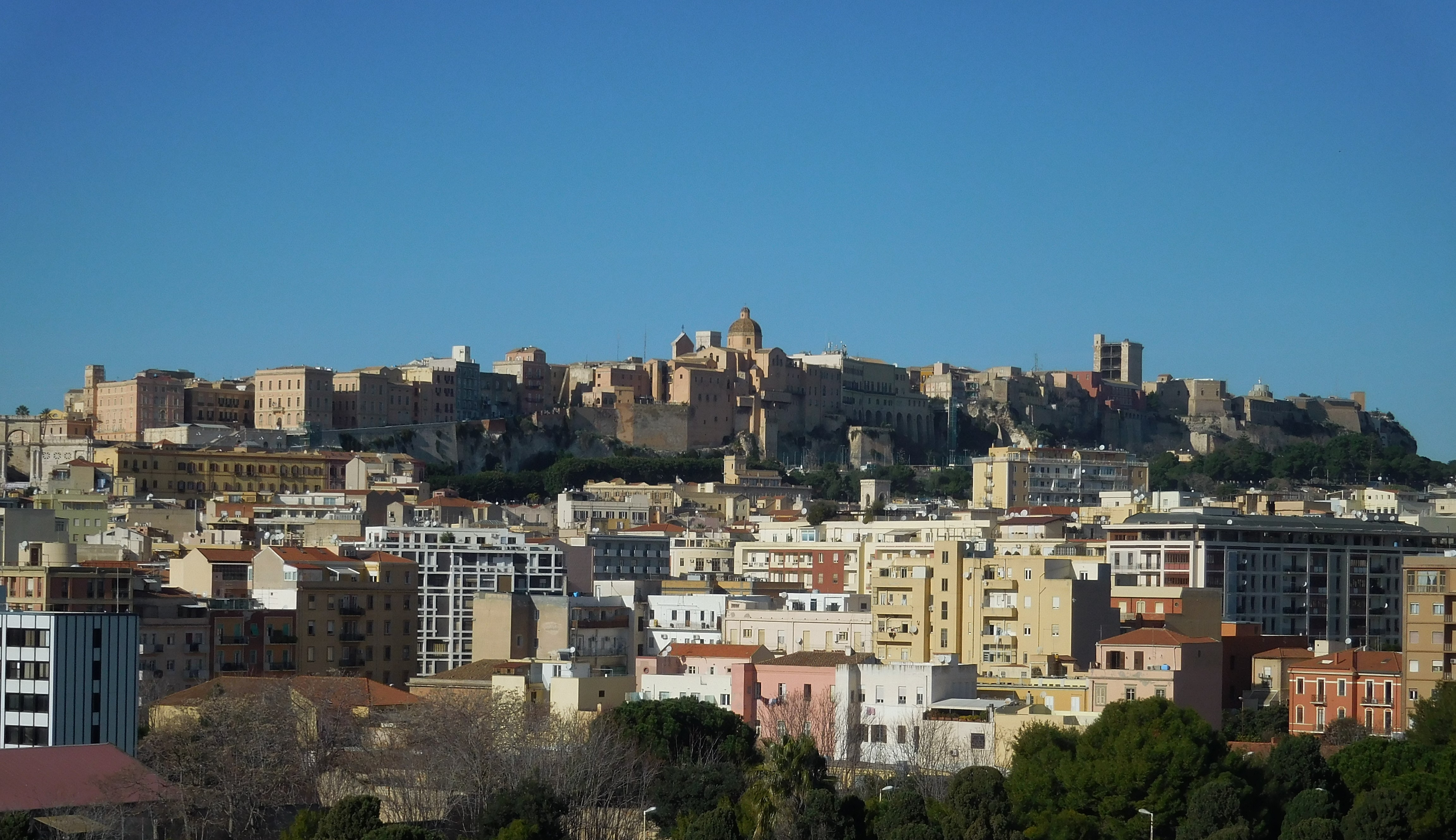 Staro mestno jedro z obzidjem (Il Castello)